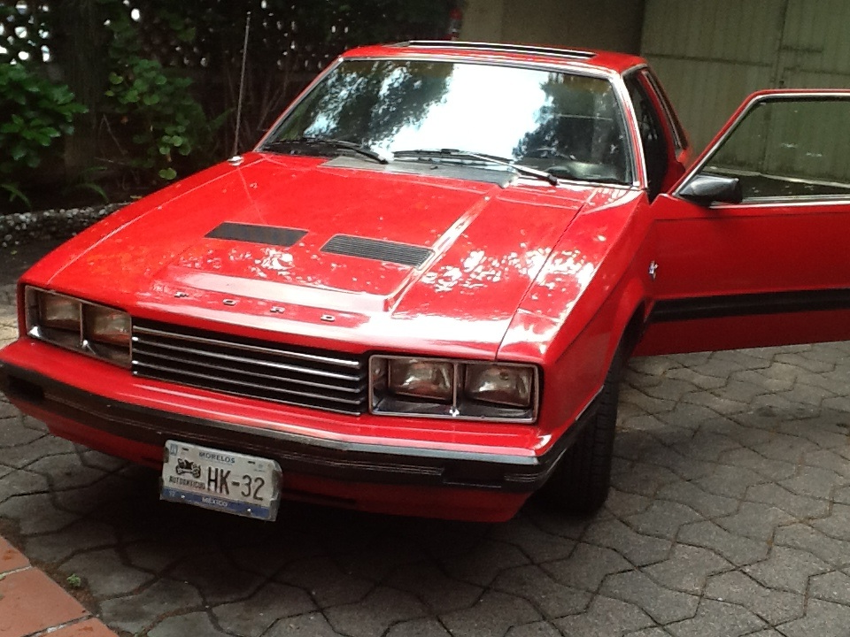 Hard top 2 puertas Automático.